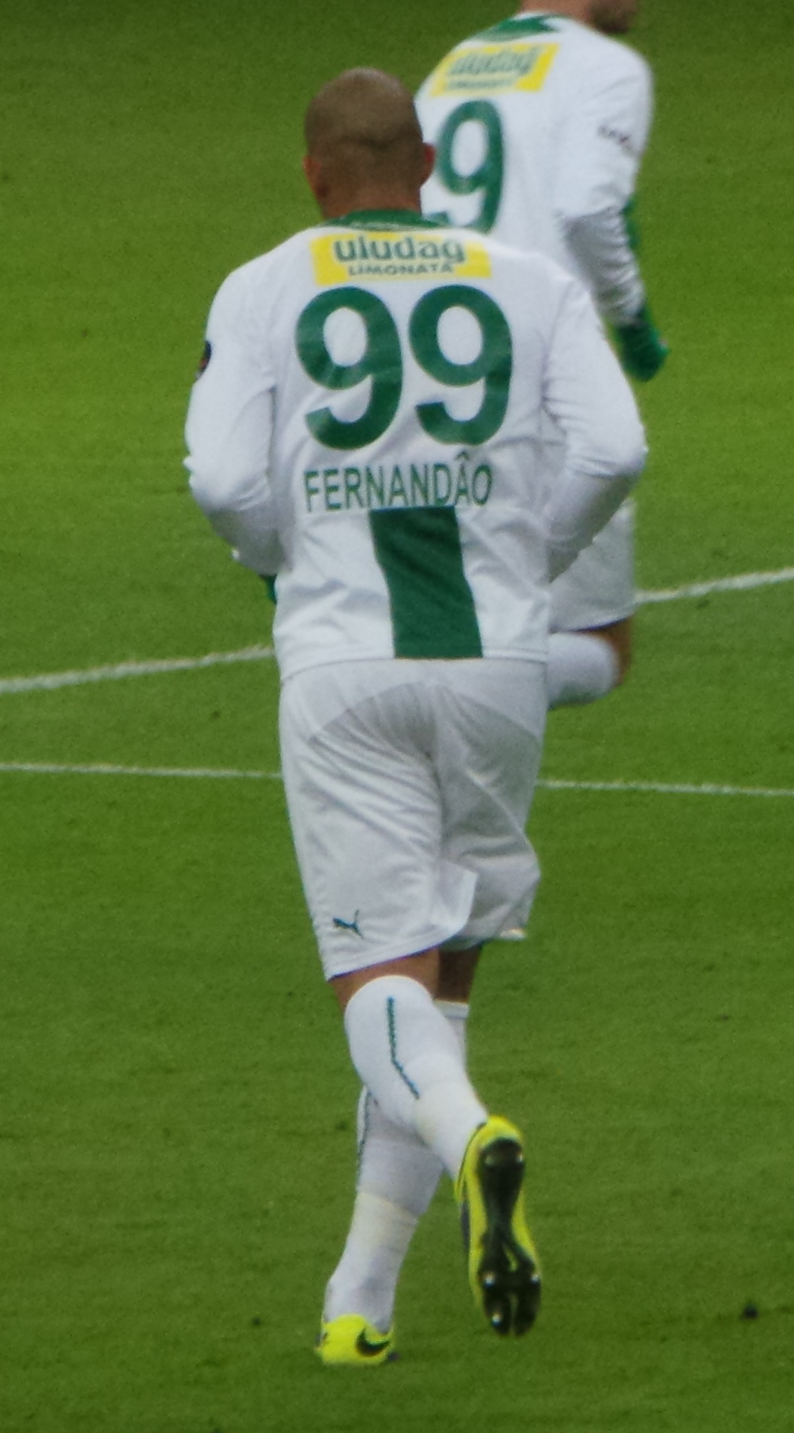 Fernandao with 99 number